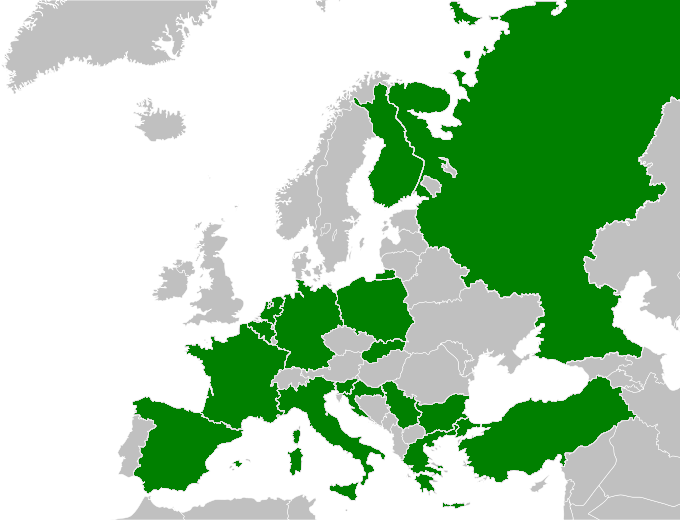 Reprezentacje biorące udział w Mistrzostwach Europy w Piłce Siatkowej Mężczyzn 2007.